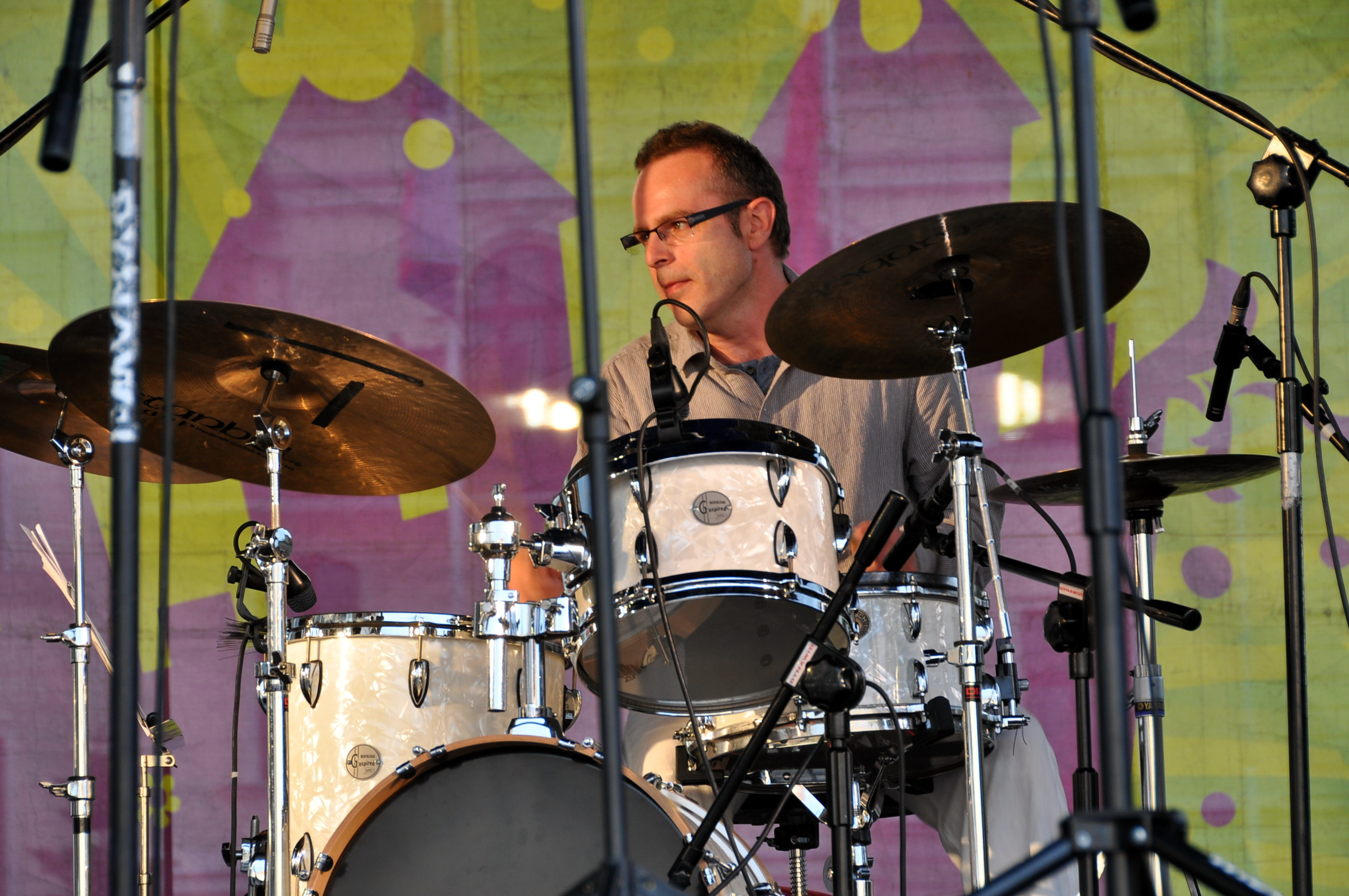 Marcin Jahr, Bydgoszcz 1 sierpnia 2011.